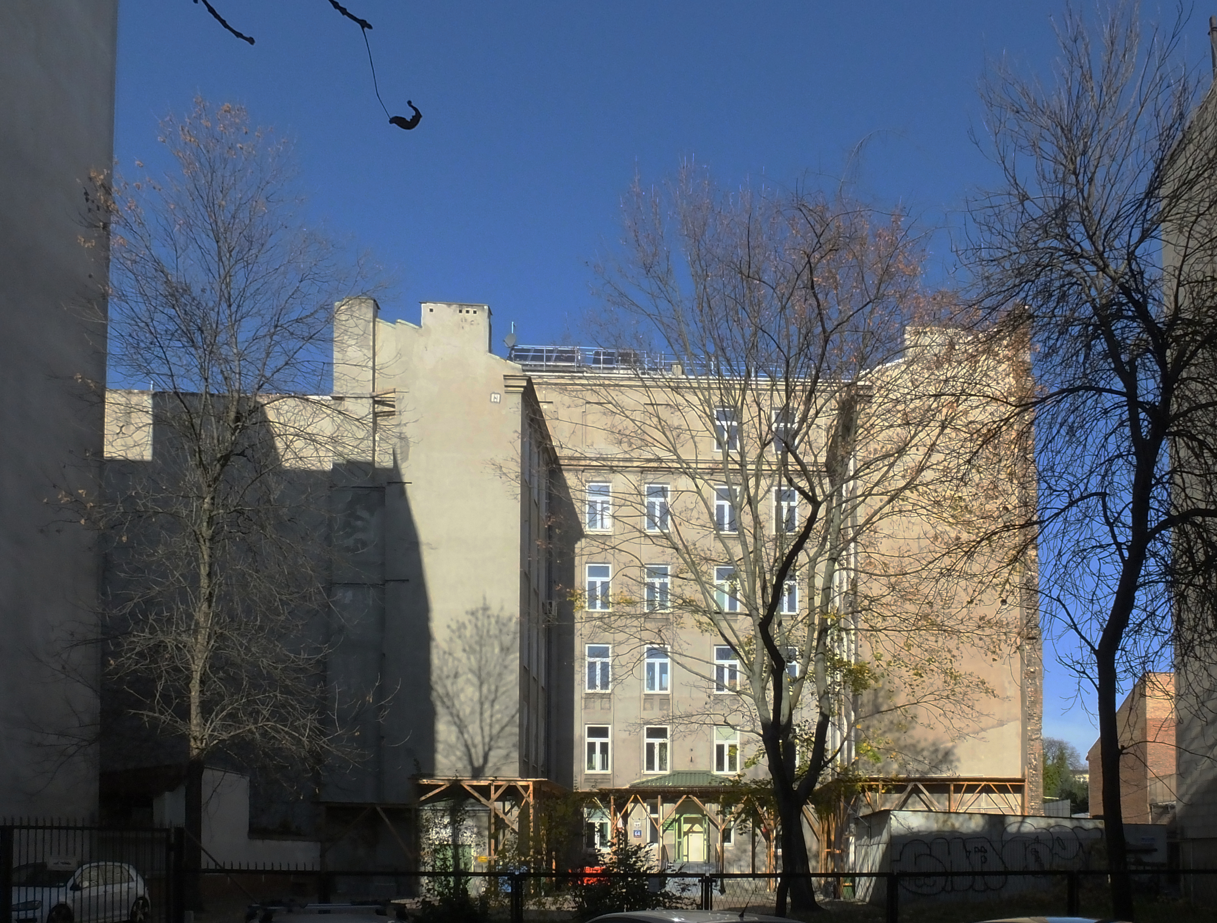 Siedziba Muzeum i Instytutu Zoologii PAN w Warszawie, ulica Wilcza 64